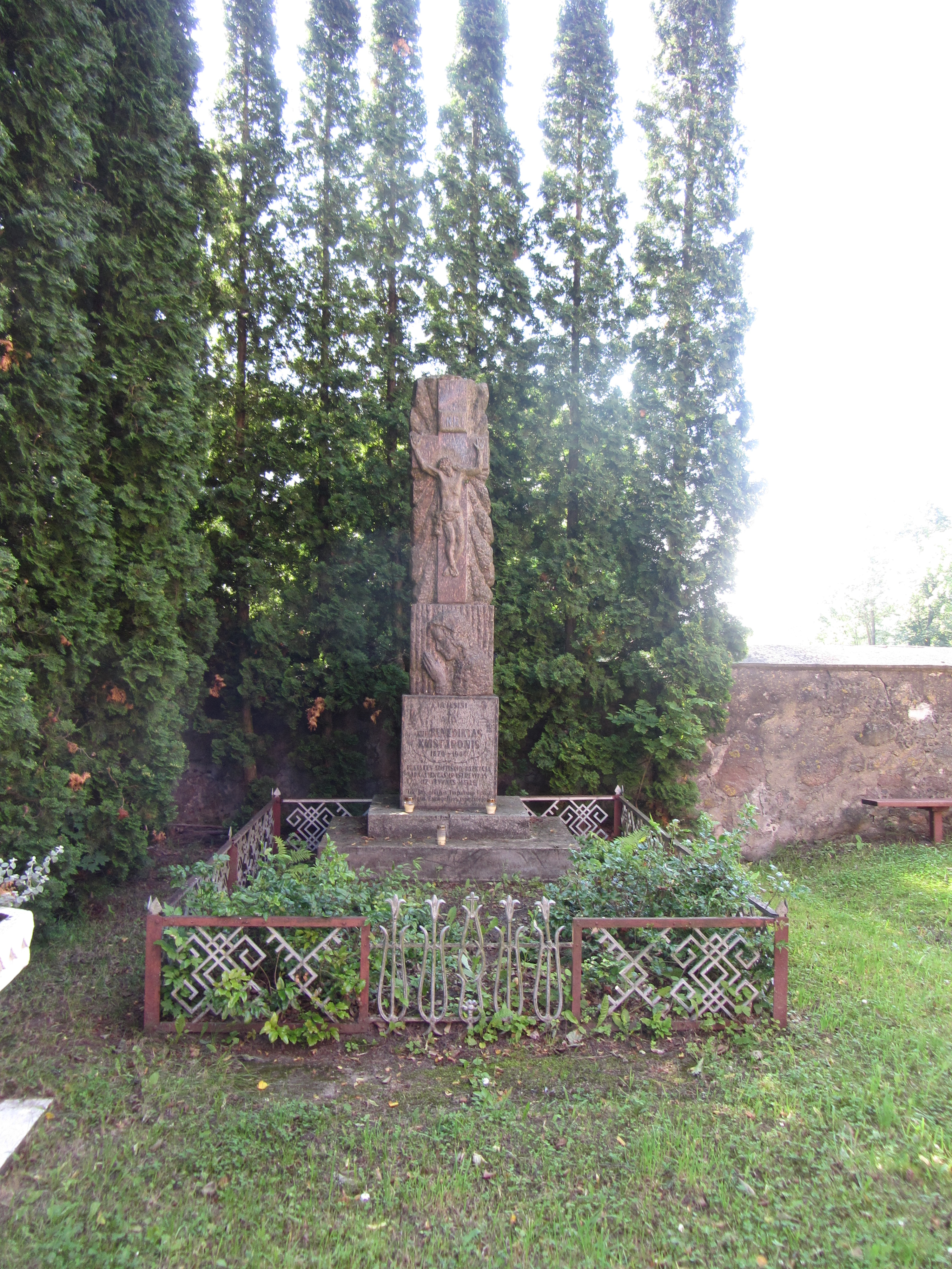 Adutiškis, Lithuania